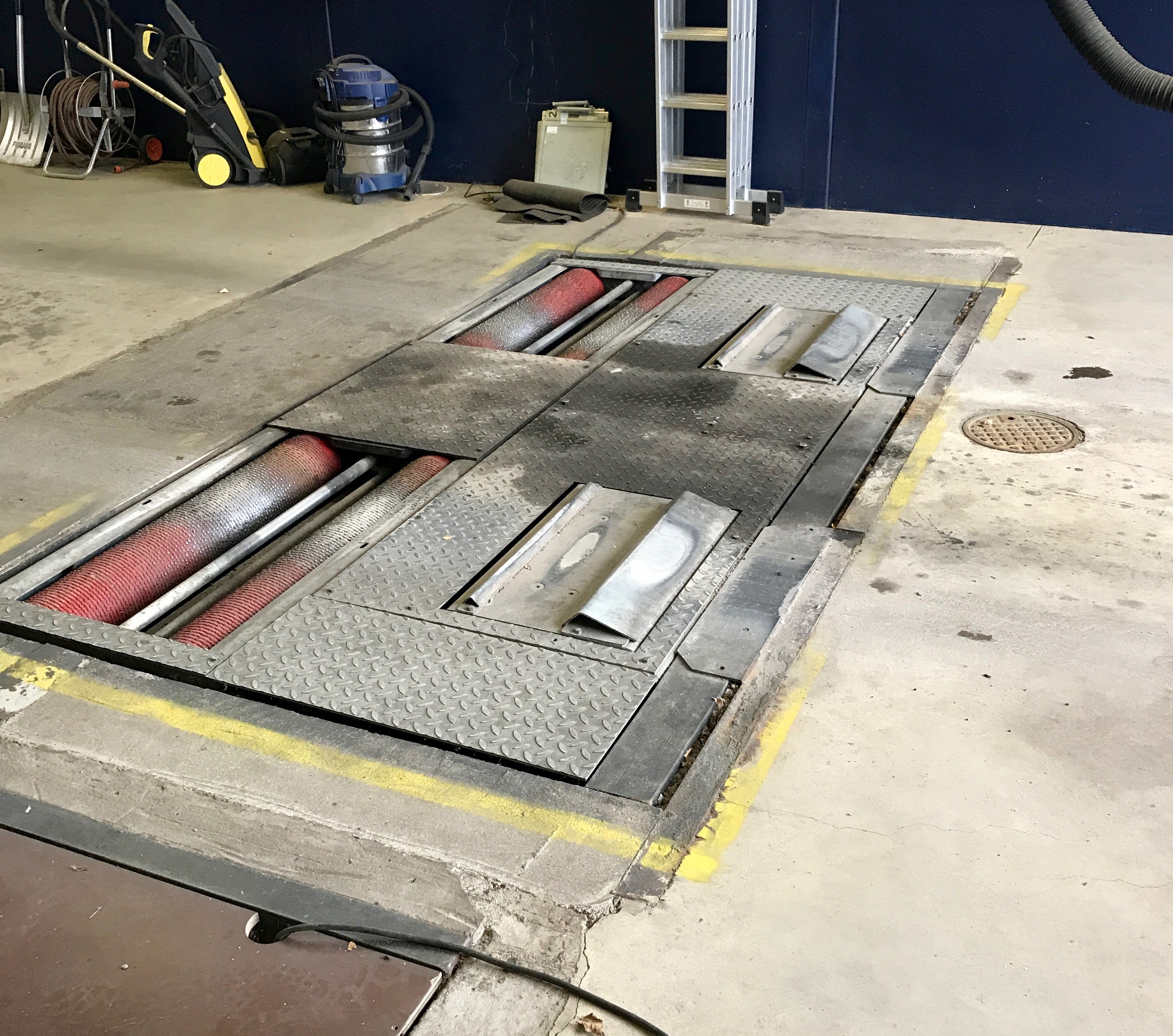 2-pyöräjarrudynamometri katsastusasemalla.